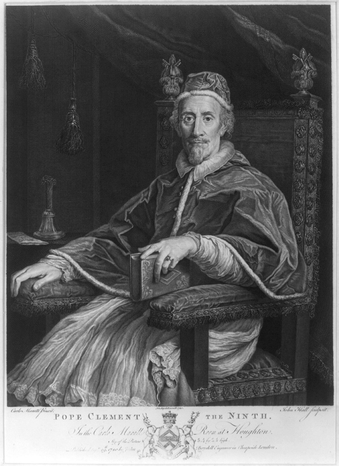 Klemens IX.